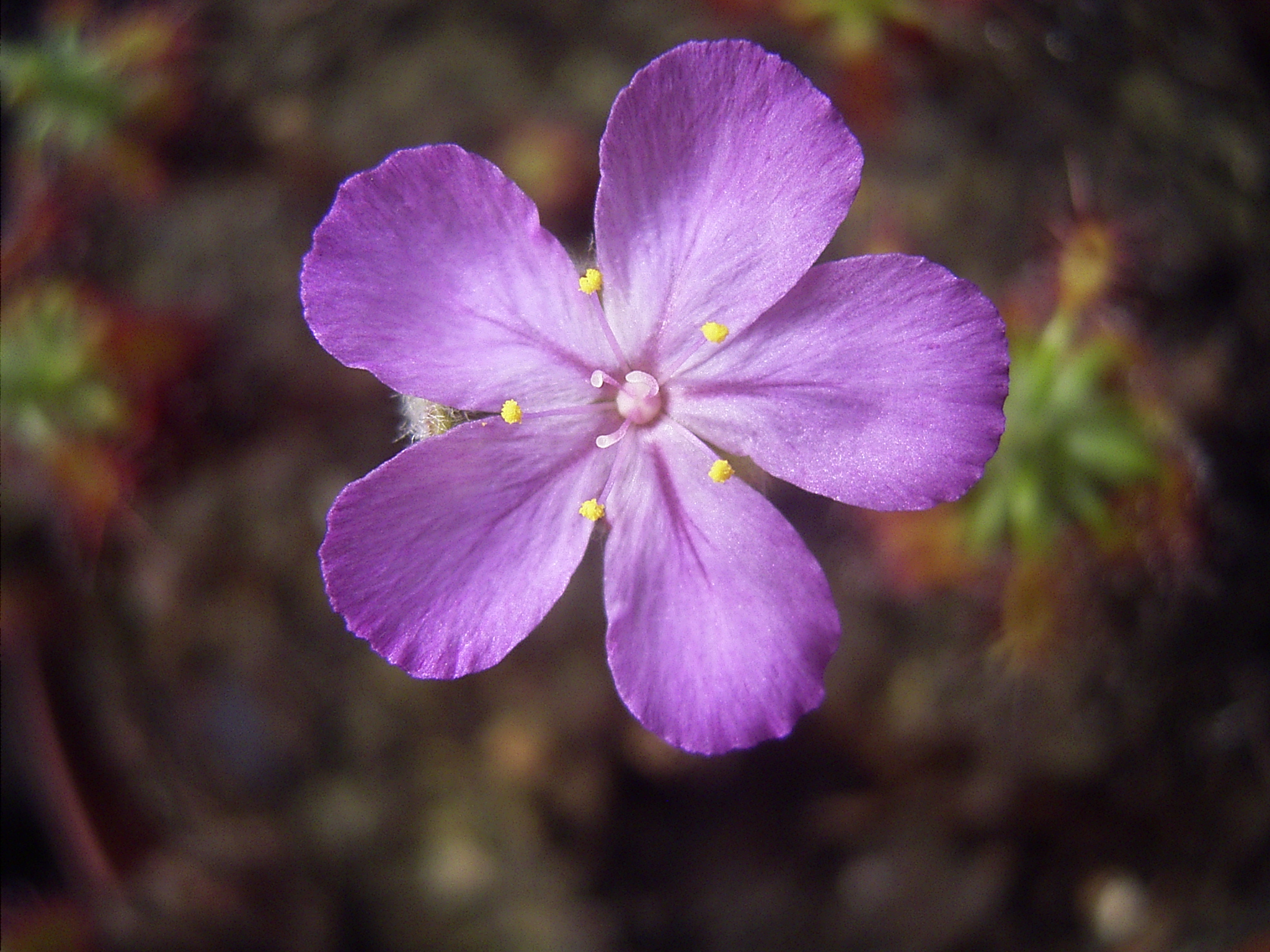 Drosera lasiantha flora